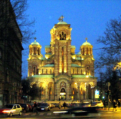 Die ab 1936 erbaute Kirche des Hl. Markus in Belgrad